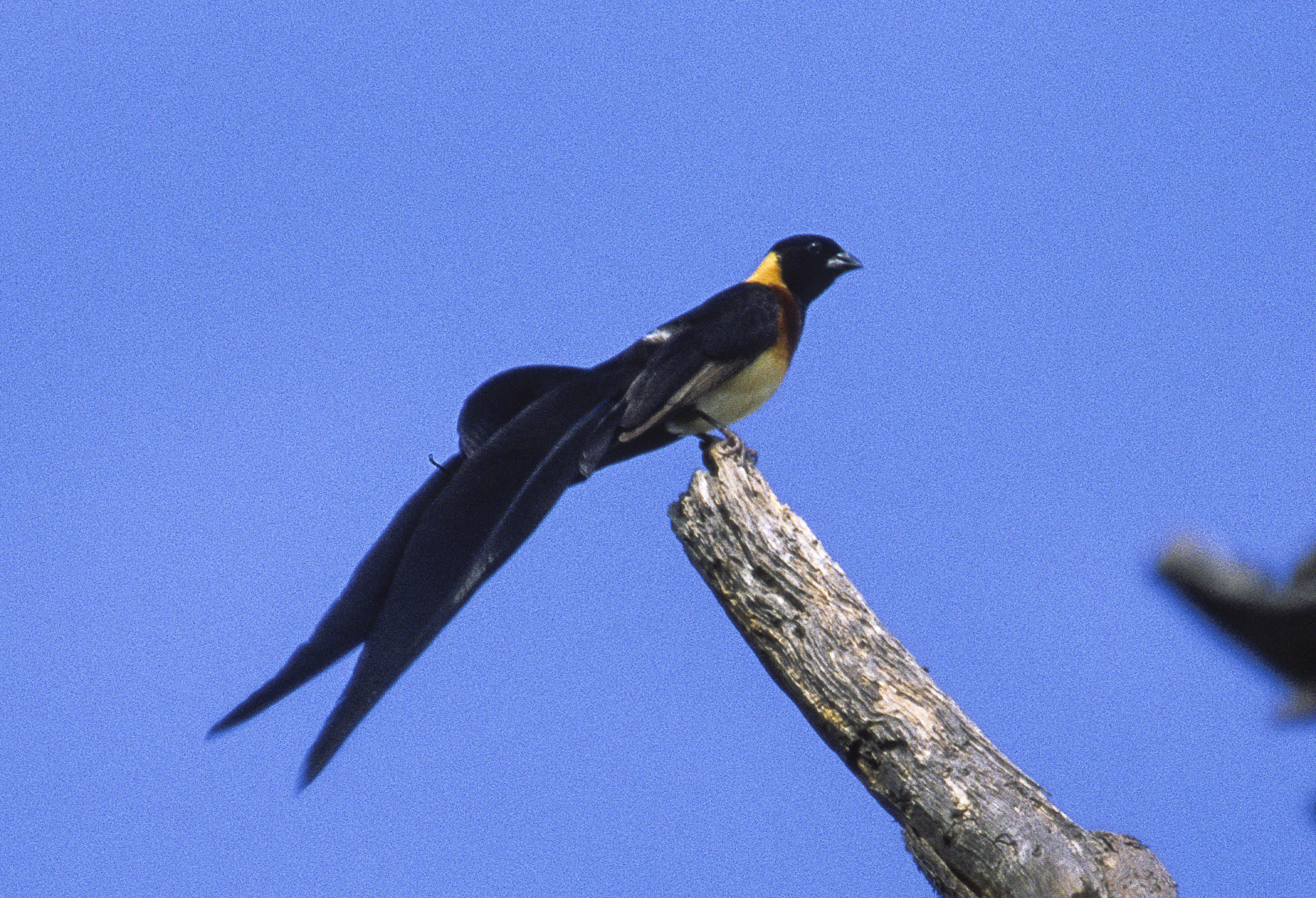 Eastern Paradise-Whydah - Namibia 980033